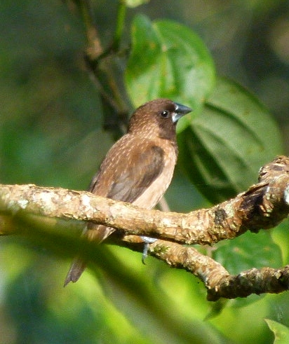 Lonchura kelaarti jerdoni, Mudigere